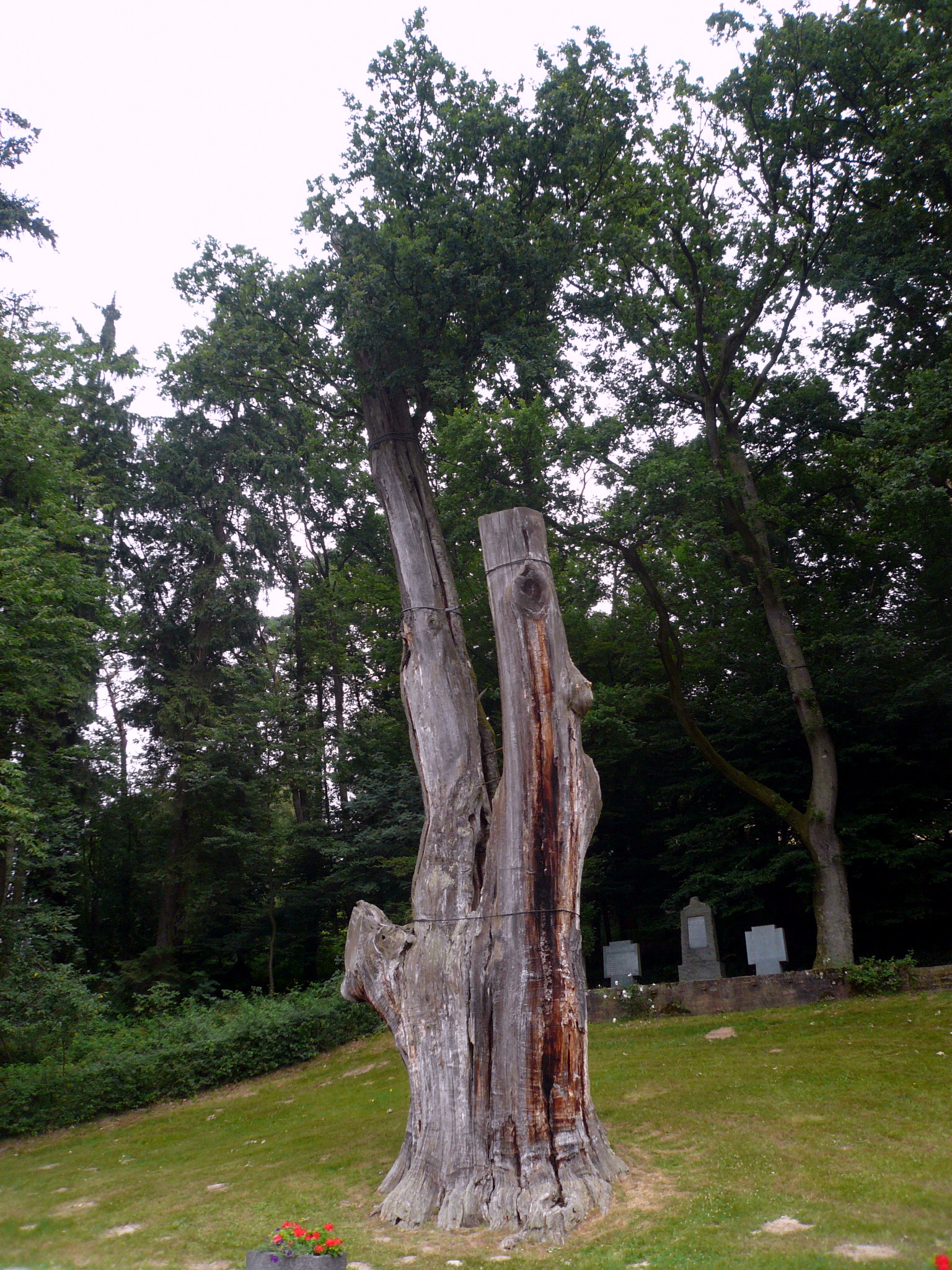 Dicke Eiche bei Airlenbach